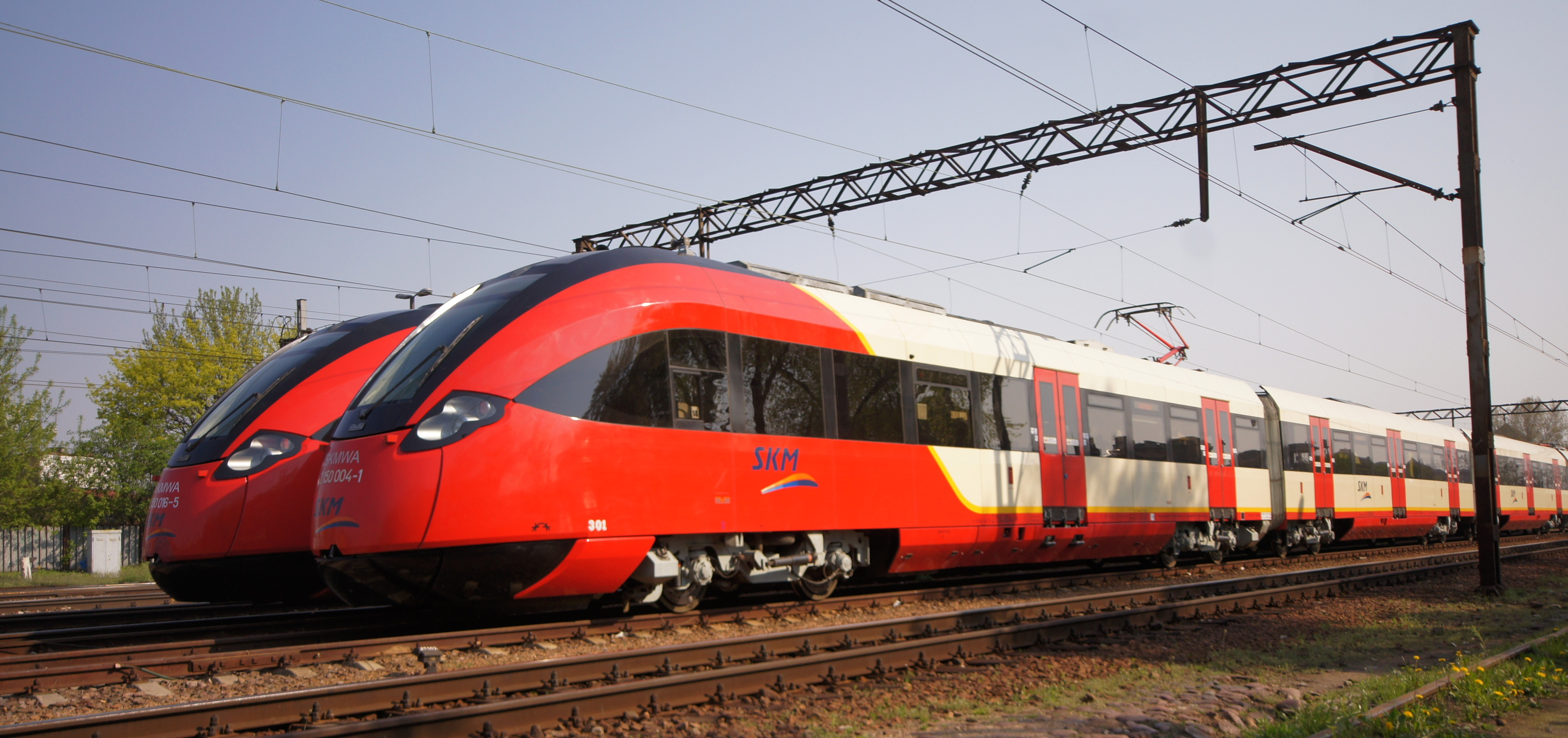 Pociąg typu 19WE - SKM Warszawa - Linia S1